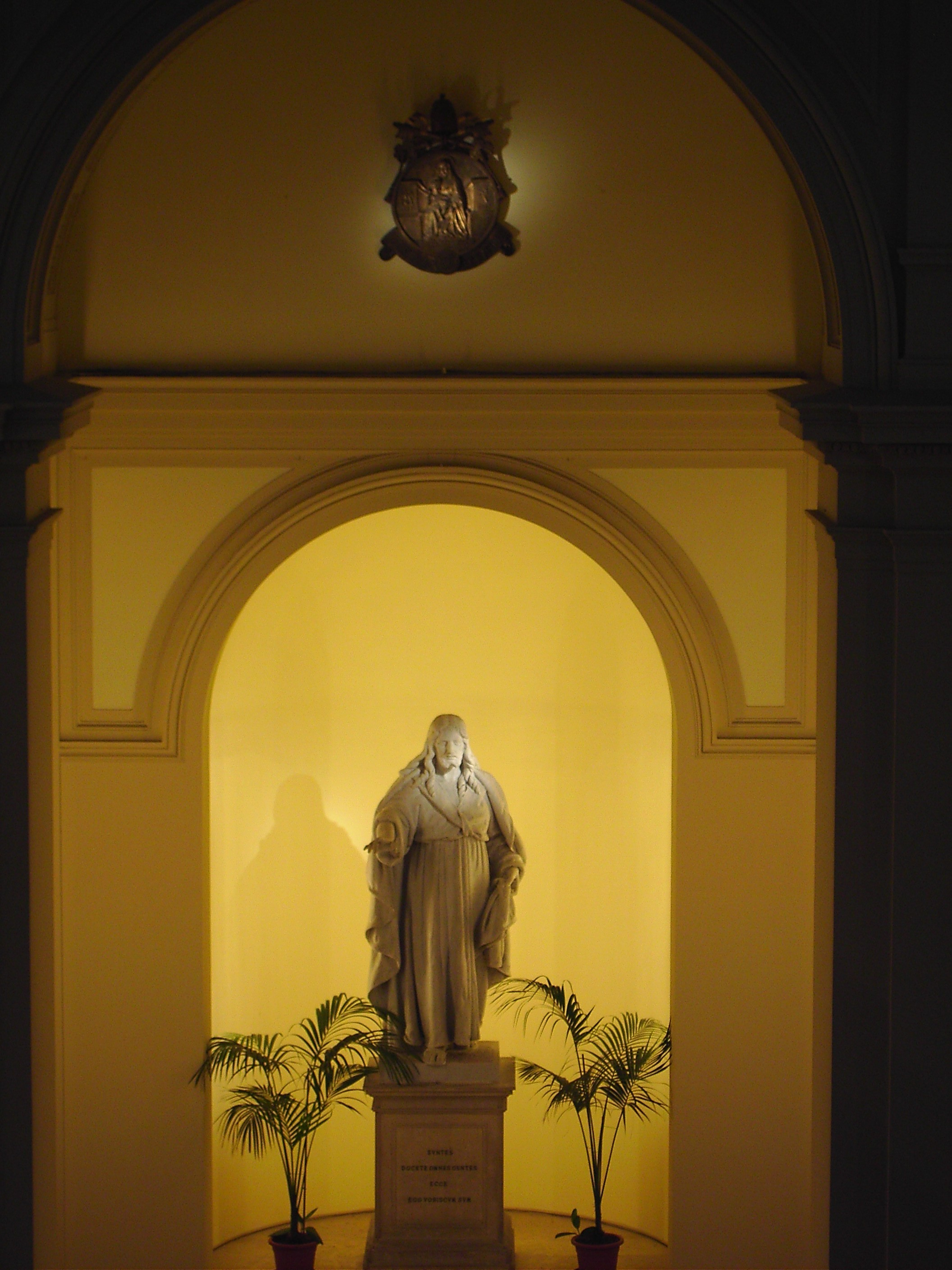 cuadripórticouniversidadgregorianasagradocorazónescudoenbronce